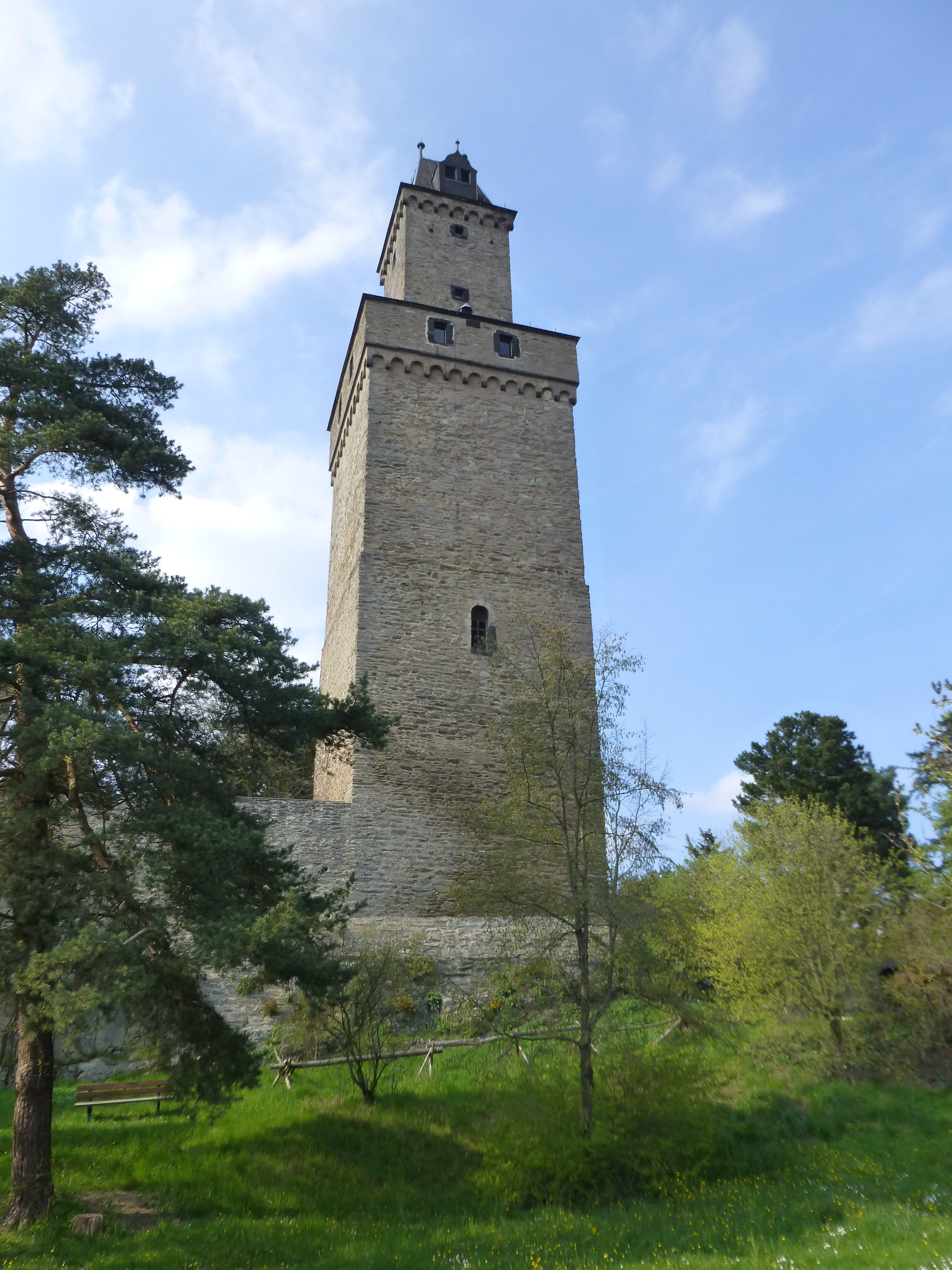 Freiturm der Burg Kronberg